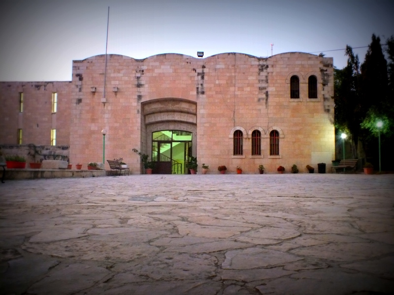 երուսաղեմի ժառանգավորաց վարժարան